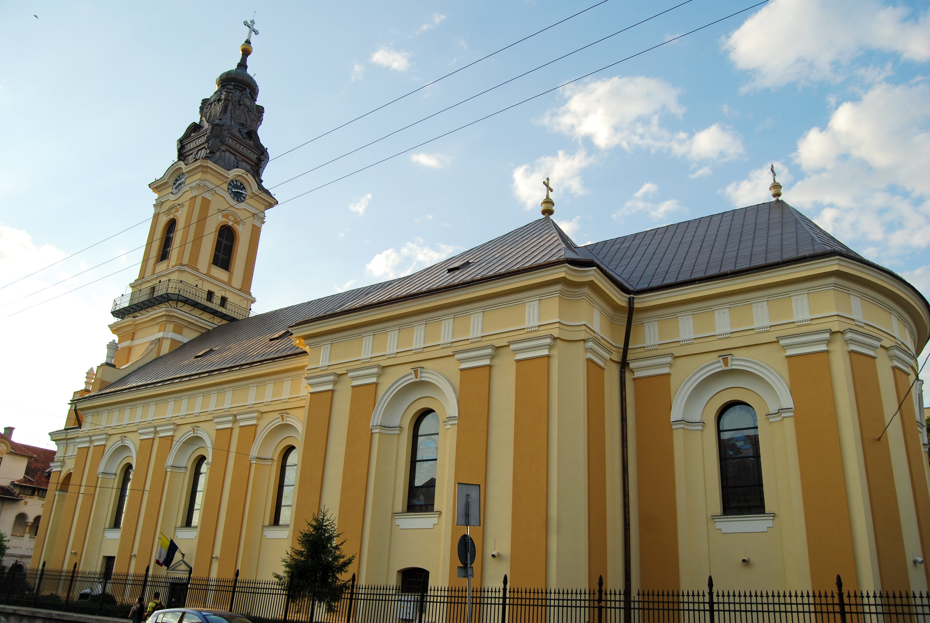 Catedrala Sfântul Nicolae, Oradea